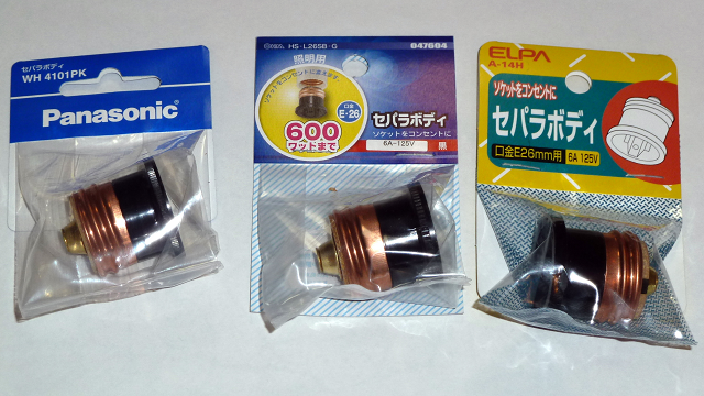 各社製のセパラボディ